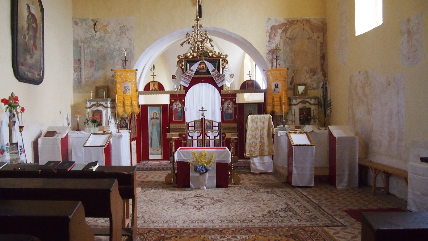 Foto